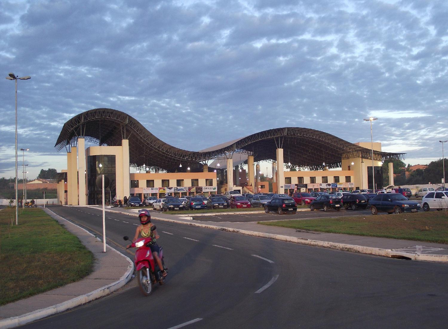 Terminal Rodoviário de Imperatriz Governador Jackson Lago. Imperatriz Maranhão.